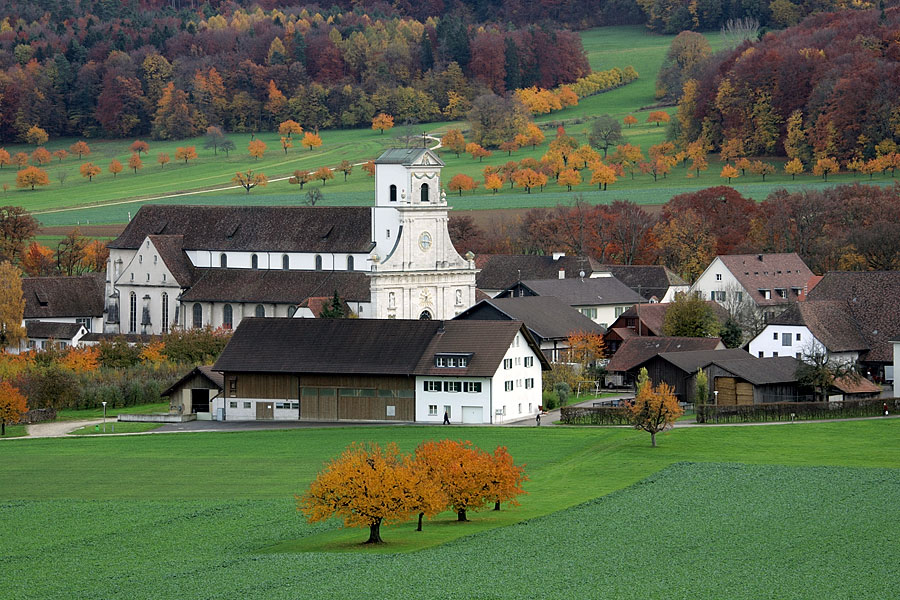 Kloster Mariastein bei Metzerlen